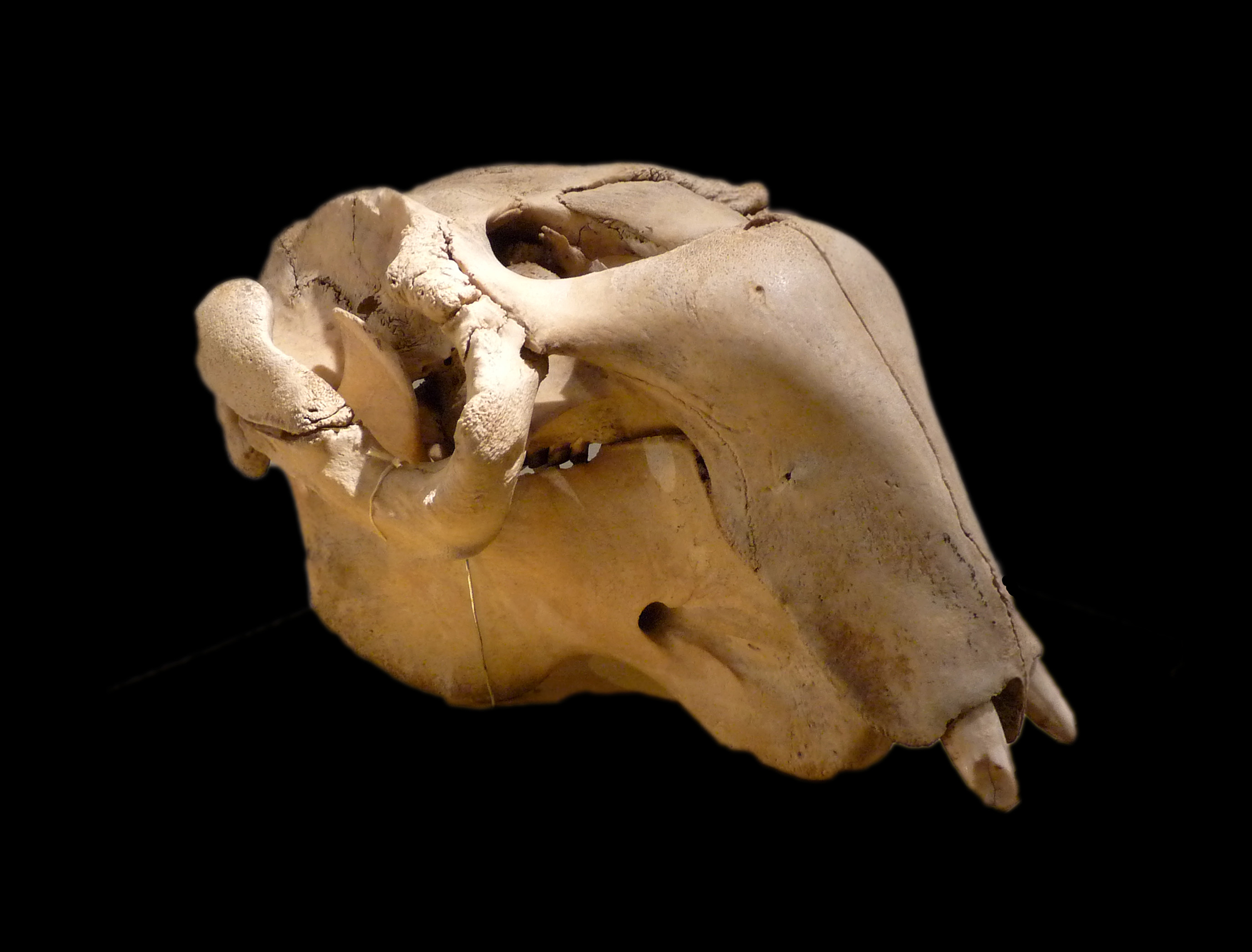 Crâne de Dugong dugon. Musée zoologique de Strasbourg